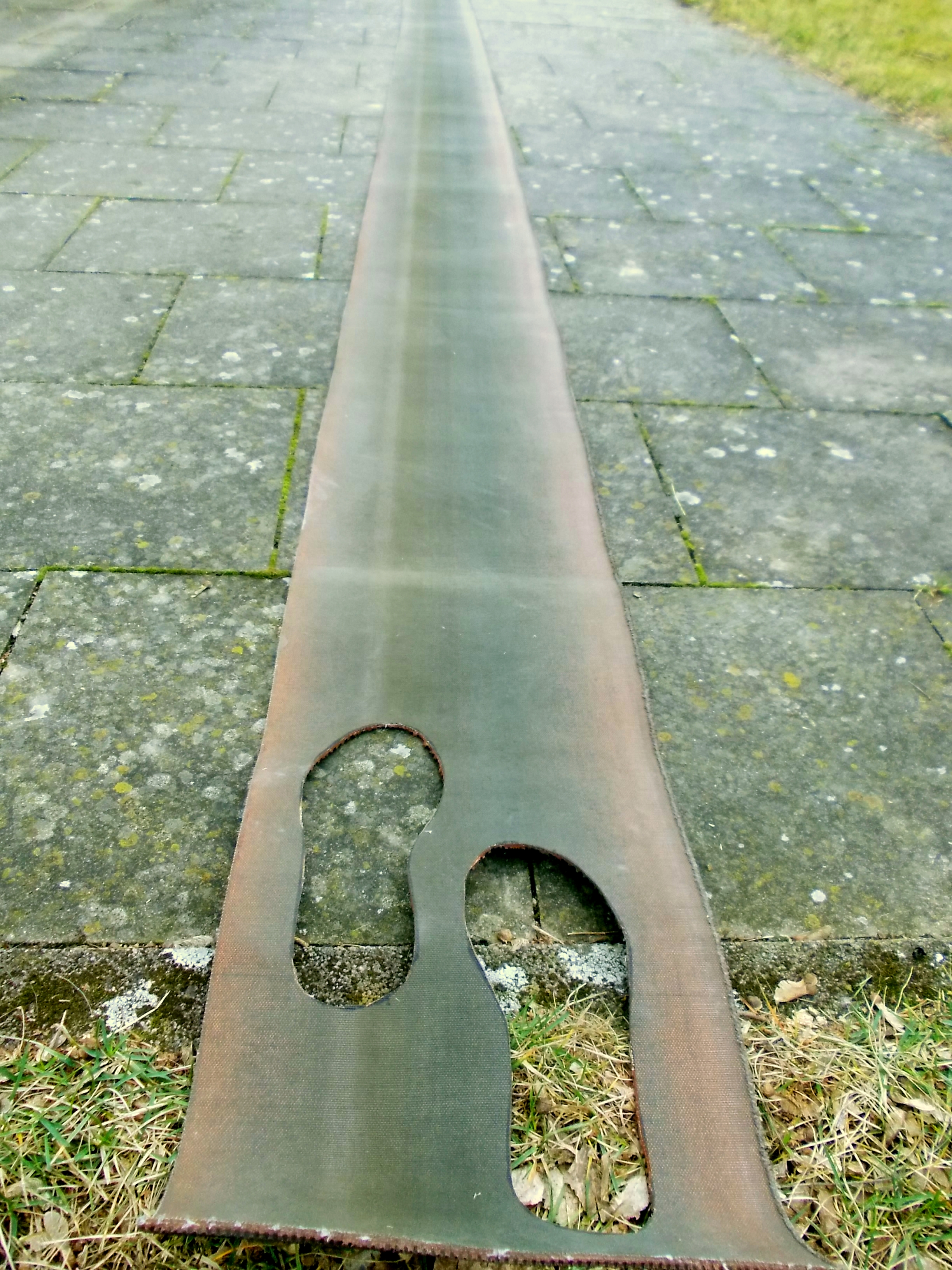 Arbeit aus einem Sohlenrohling einer Schuhfabrik